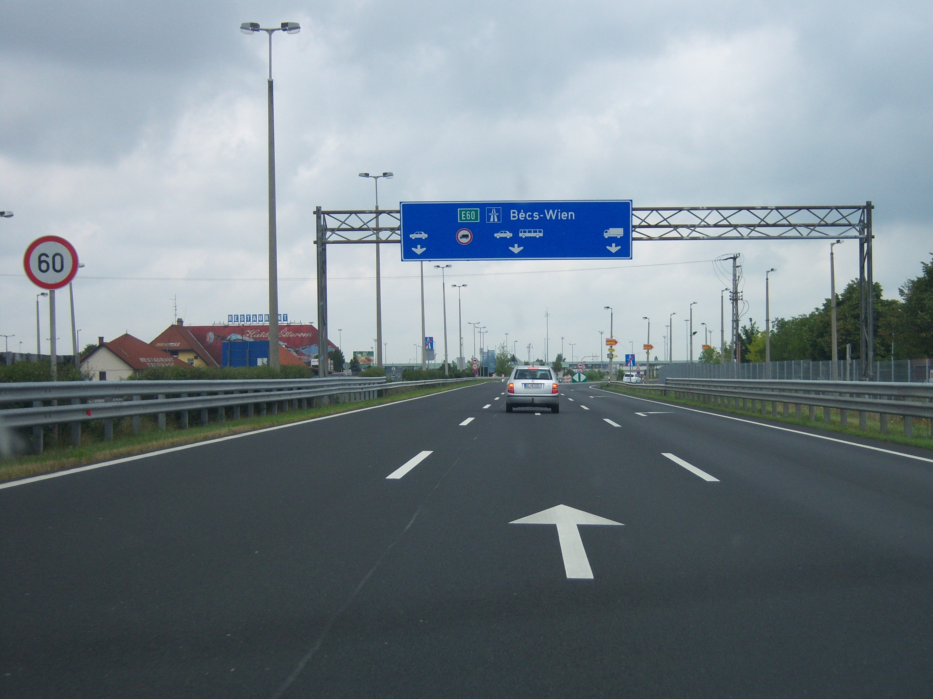 Autópálya M1 Richtung Wien kurz vor der österreich-ungarischen Grenze